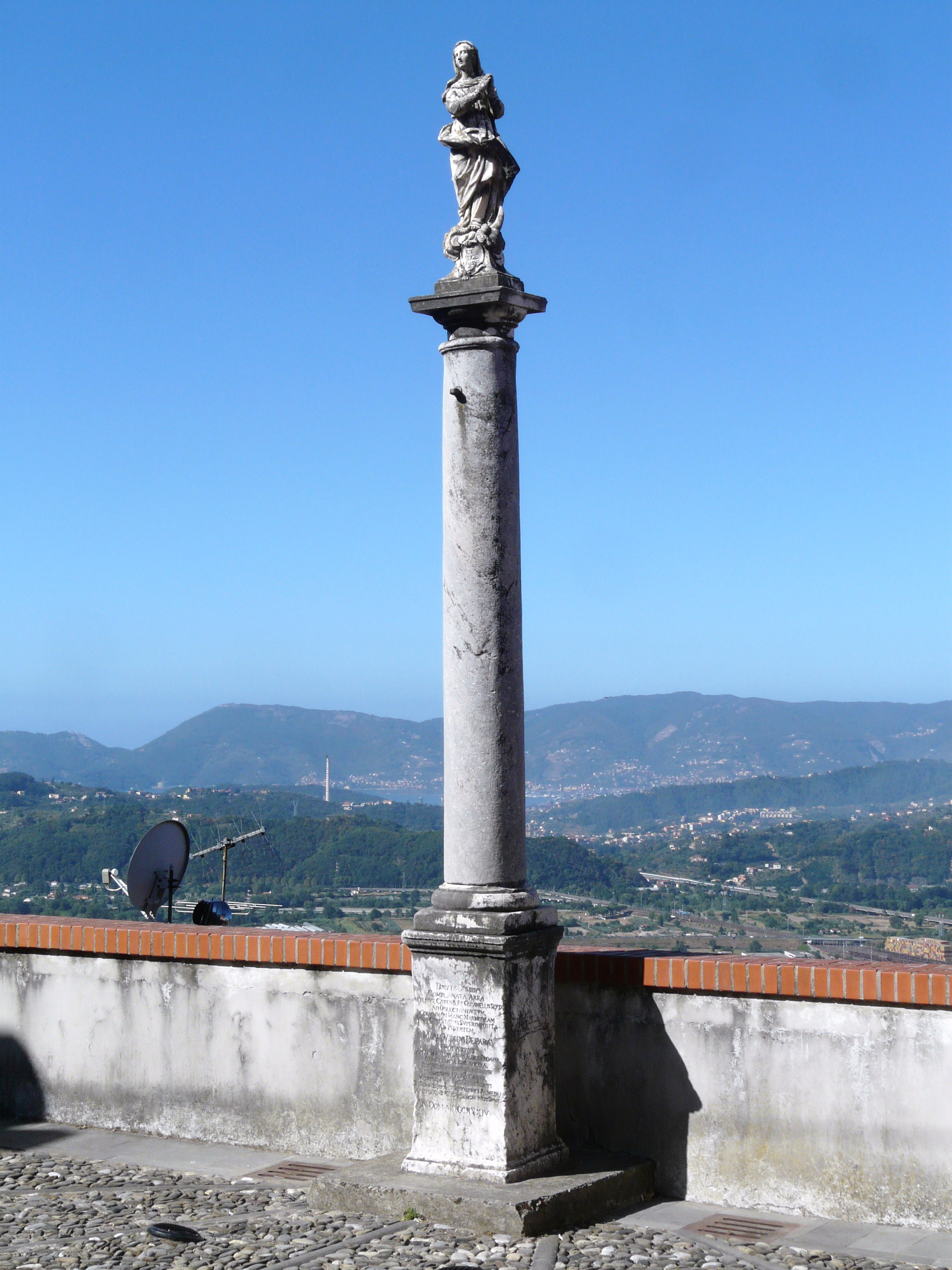 Colonna dell'Immacolata, Ponzano Superiore, Santo Stefano di Magra, Liguria, Italia